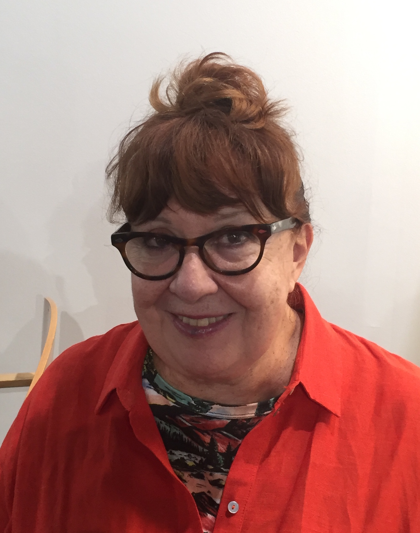 En la inauguración de la Feria de Arte Contemporáneo de Madrid ARCO 2019